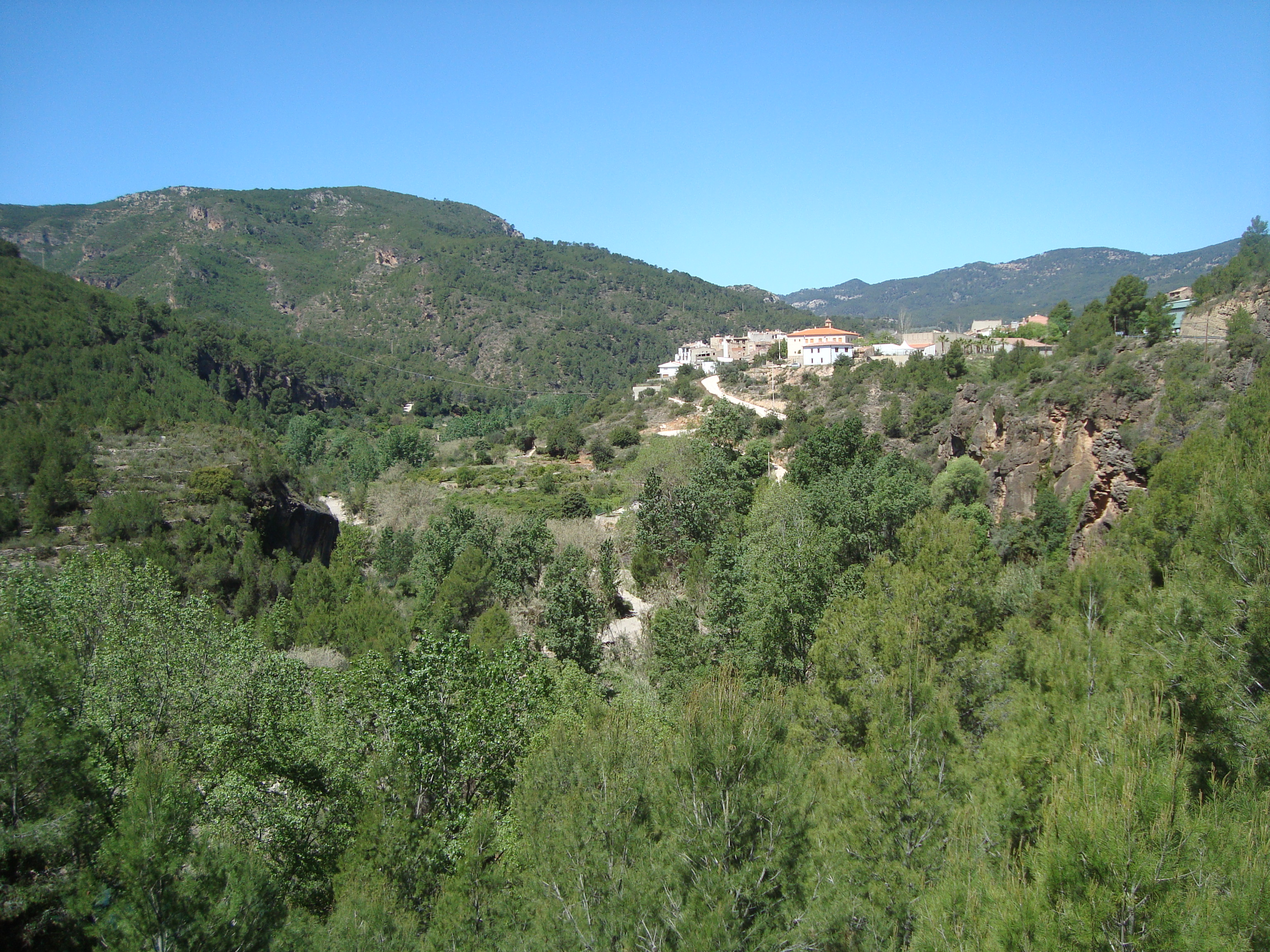 Panorámica de Torrechiva, comarca Alto Mijares (Castellón)